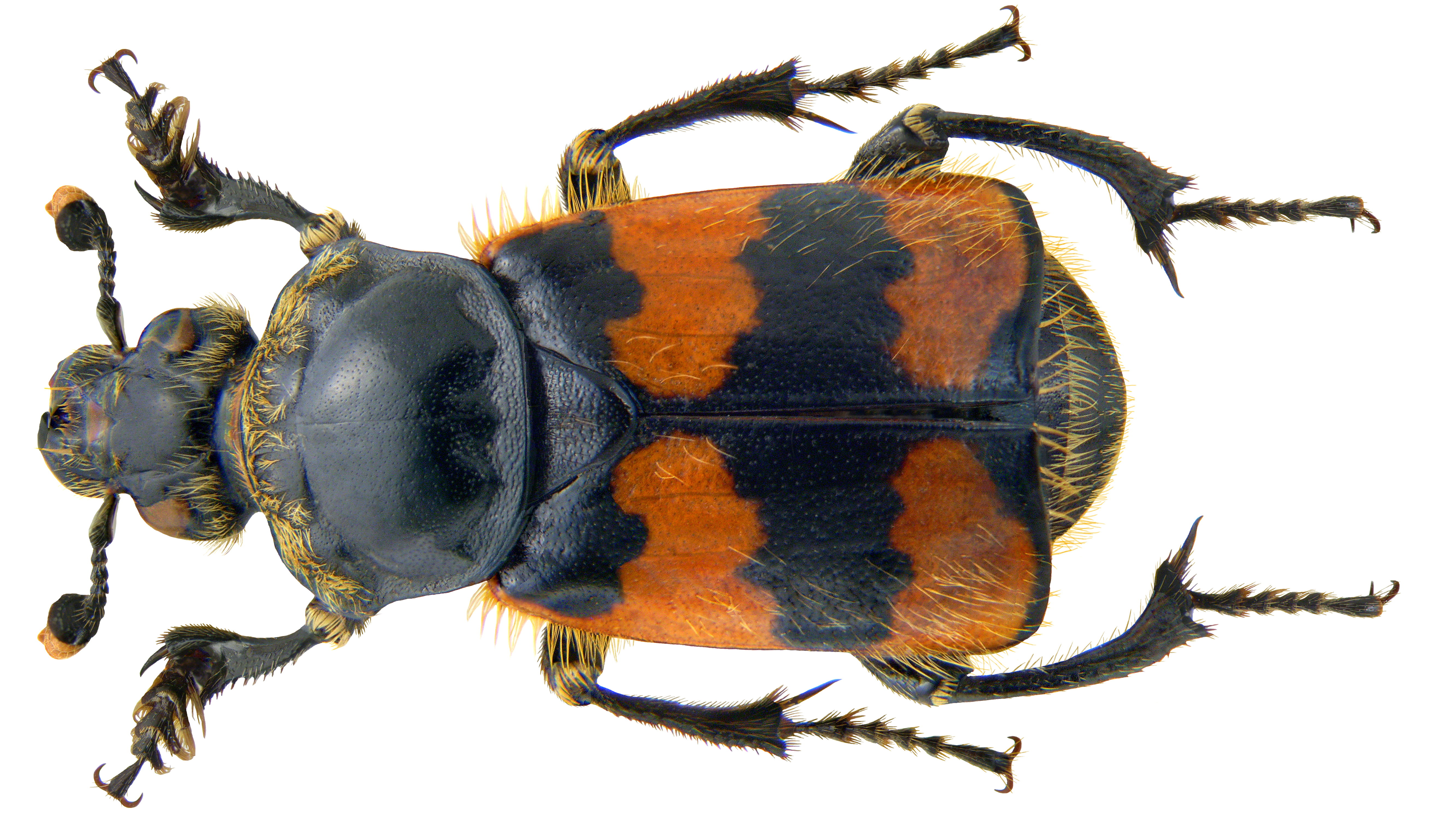 Familie: Silphidae Grösse: 12-22 mm Verbreitung: holarktisch Ökologie: an Aas Fundort: Germania, Bayern, Oberfranken, Kulmbach leg.det. U.Schmidt, 1984 Foto: U.Schmidt, 2009